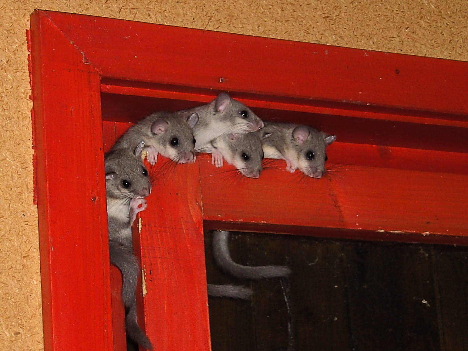 Siebenschlaefer (Glis glis), Fünf neugierige Jungtiere auf dem Fensterrahmen